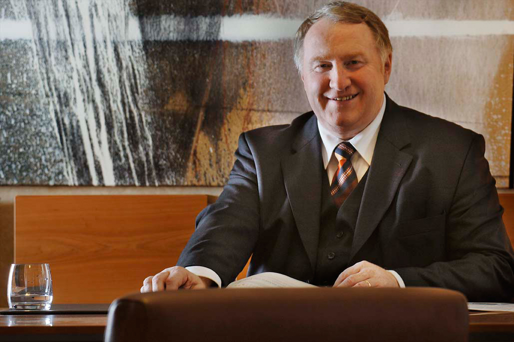 Karl-Heinz Lambertz, Ministerpräsident der Deutschsprachigen Gemeinschaft Belgiens